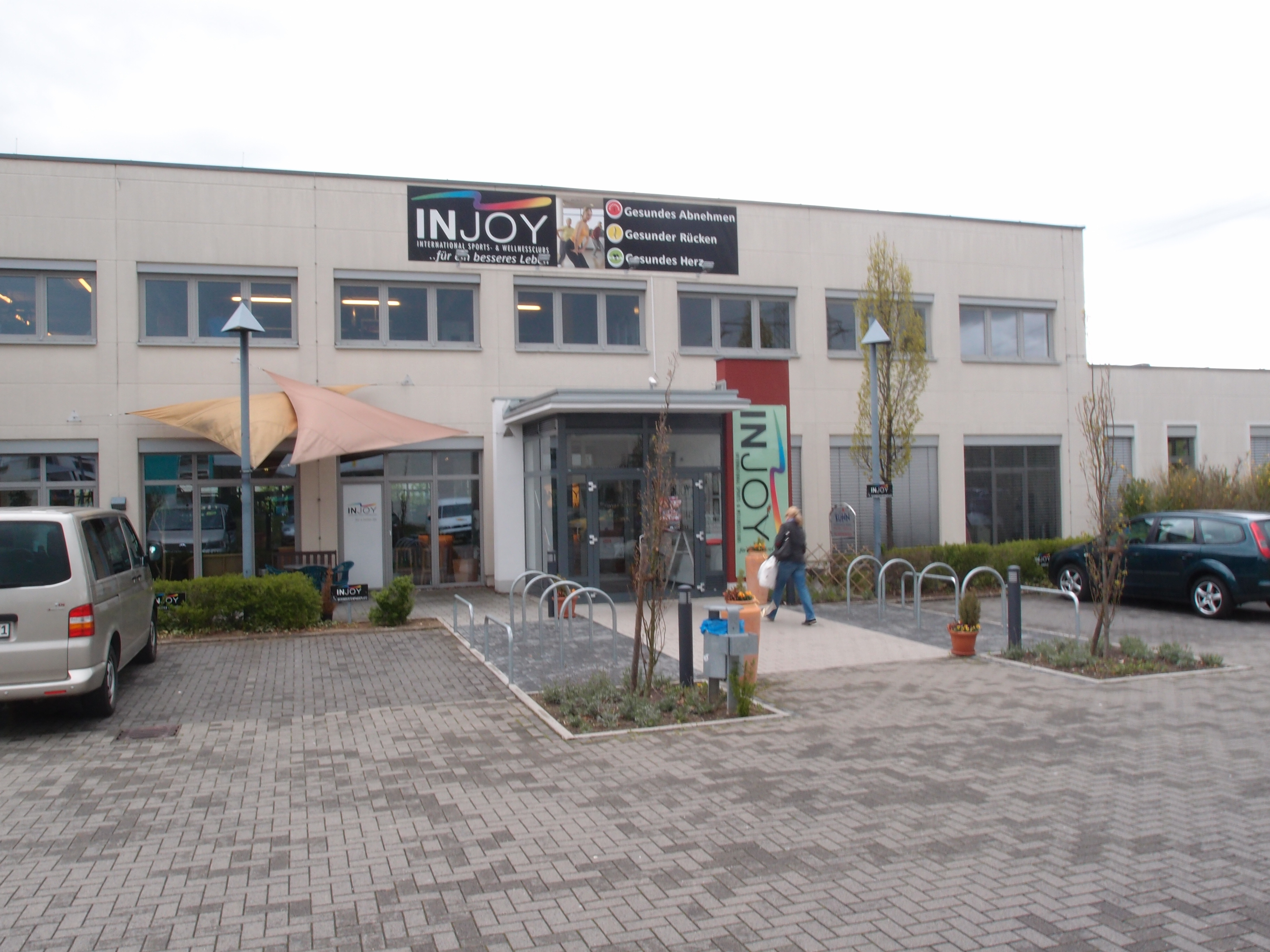 INJOY-Filiale in Köln-Wahn Datum: 21.04.2012 Urheber: M. Pfeiffer alias Benutzer:Gordito1868 Quelle: privates Fotoarchiv des Urhebers Garantieerklärung des Urhebers: es handelt sich um ein authentisches Originalfoto, das nicht via Fotomanipulation verändert wurde